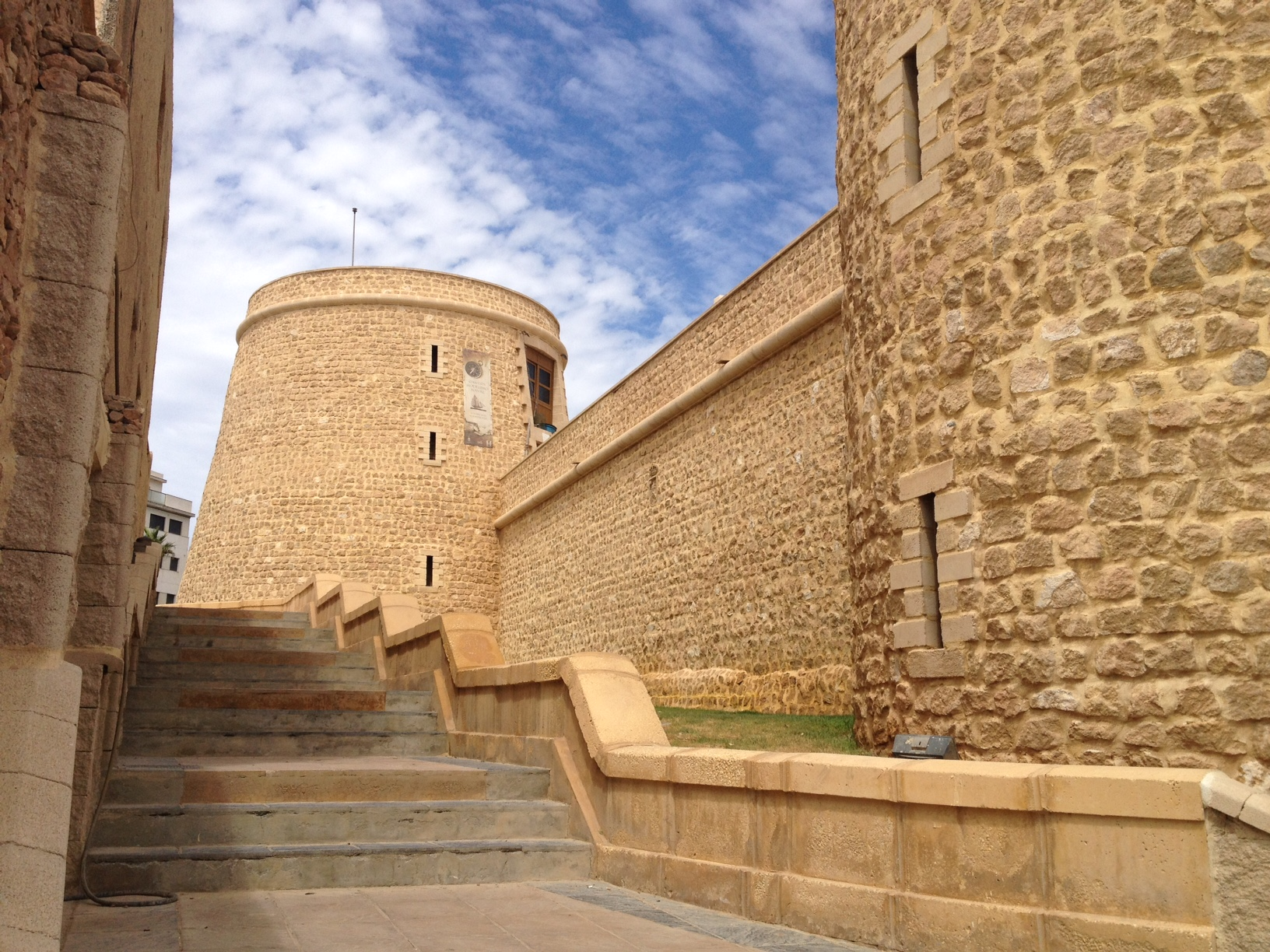 Mura di cinta